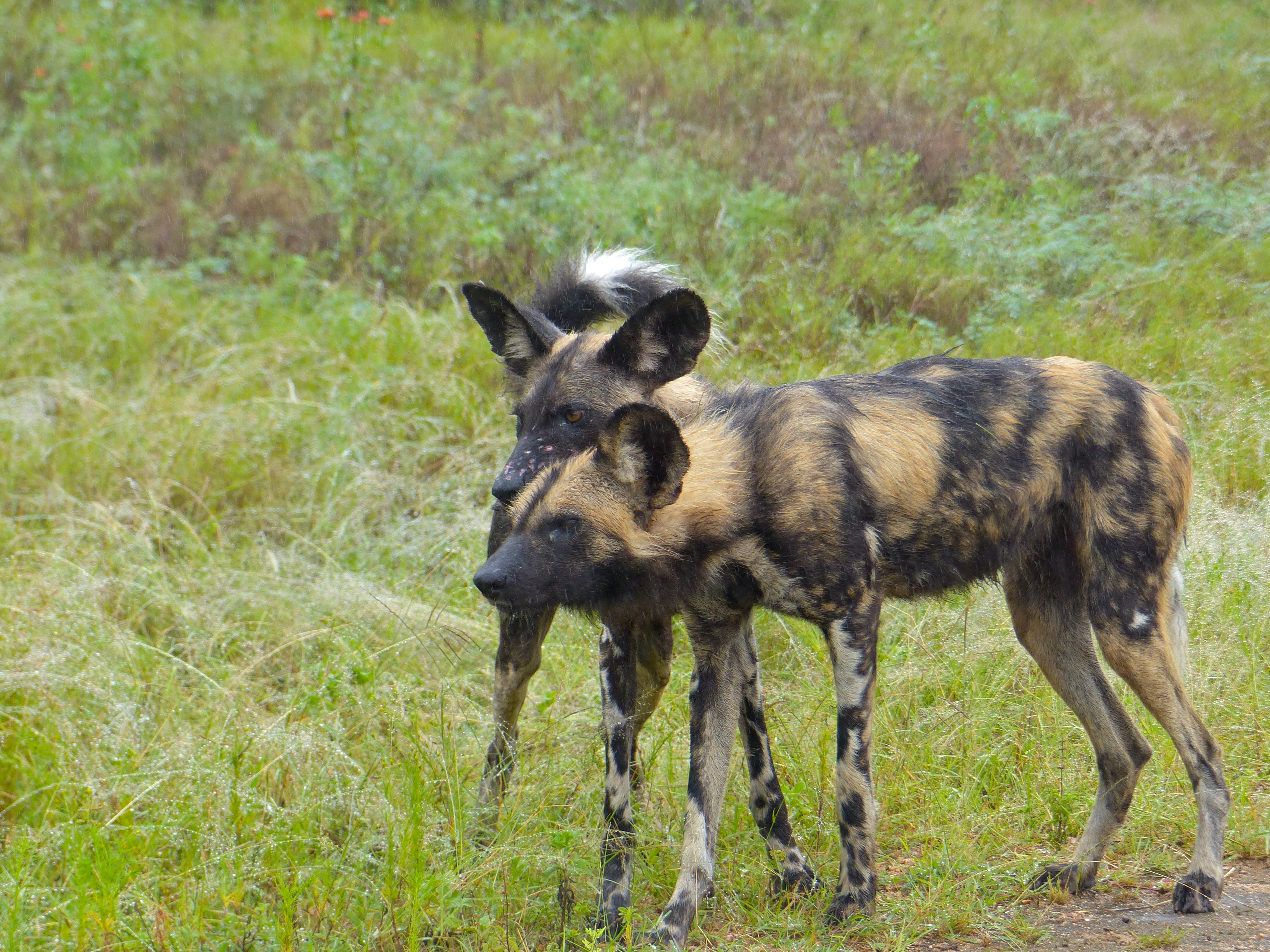 H4-1 Road East of Skukuza, Kruger NP, SOUTH AFRICA